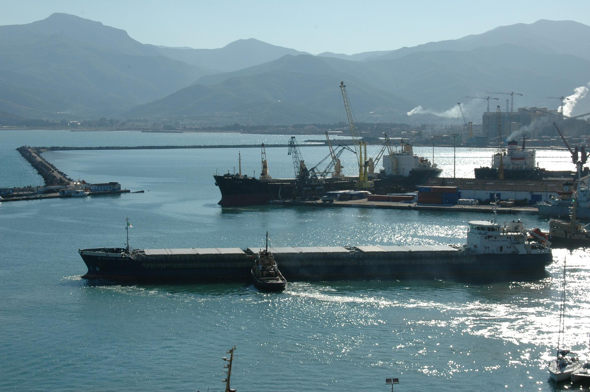 Vue sur le port de Béjaïa (Algérie).